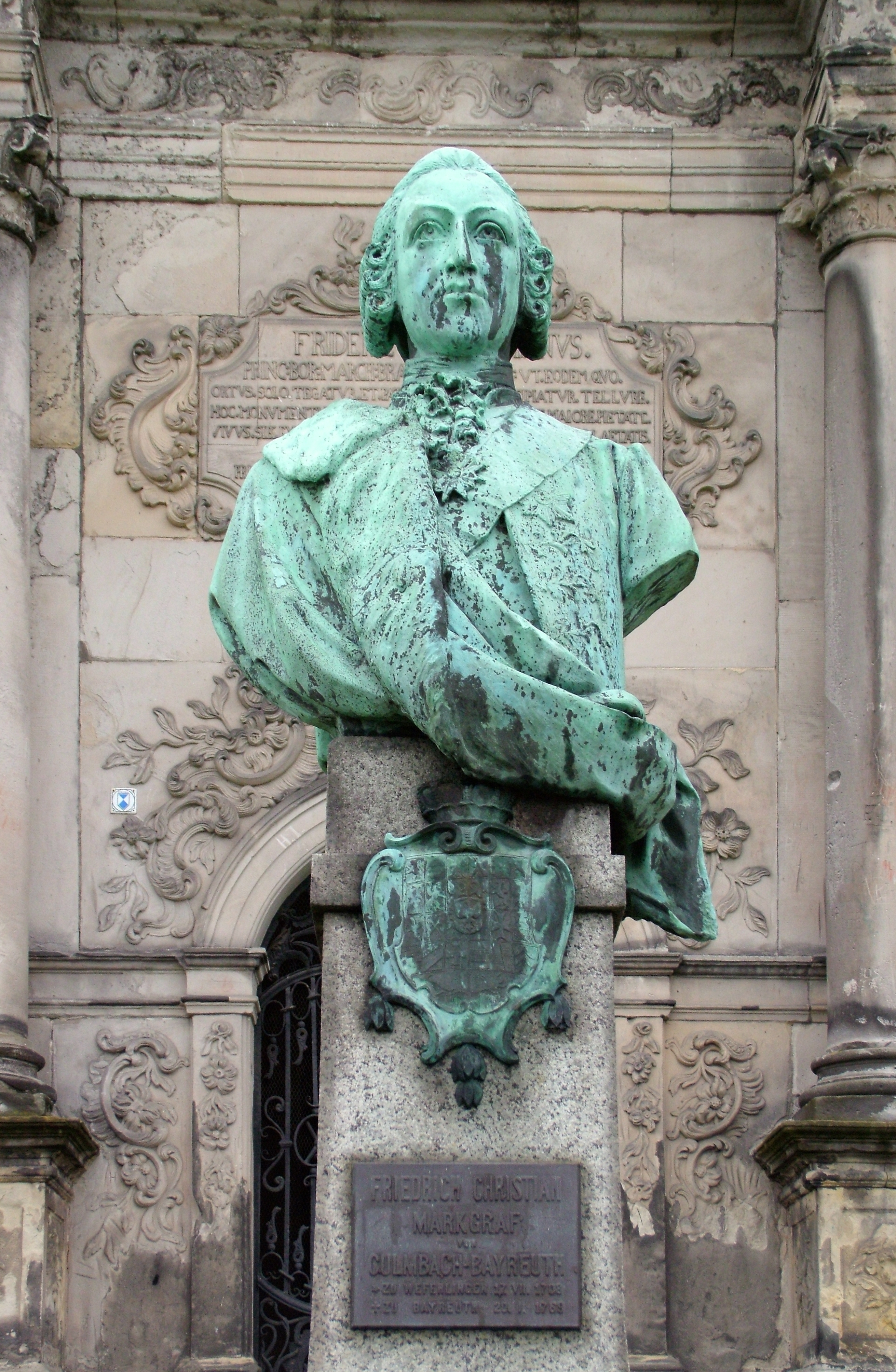 Das Denkmal für Friedrich Christian Markgraf von Culmbach-Bayreuth steht südlich der Kirche von Weferlingen.